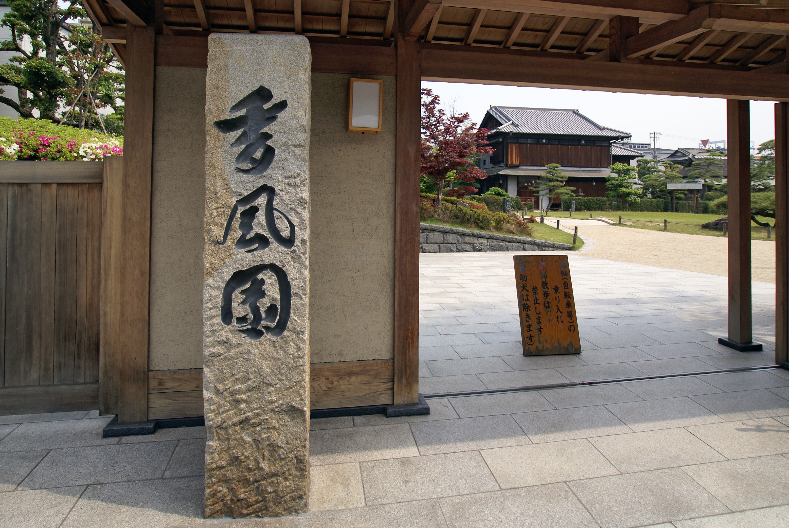 Kofuen in Sakaide, Kagawa prefecture, Japan